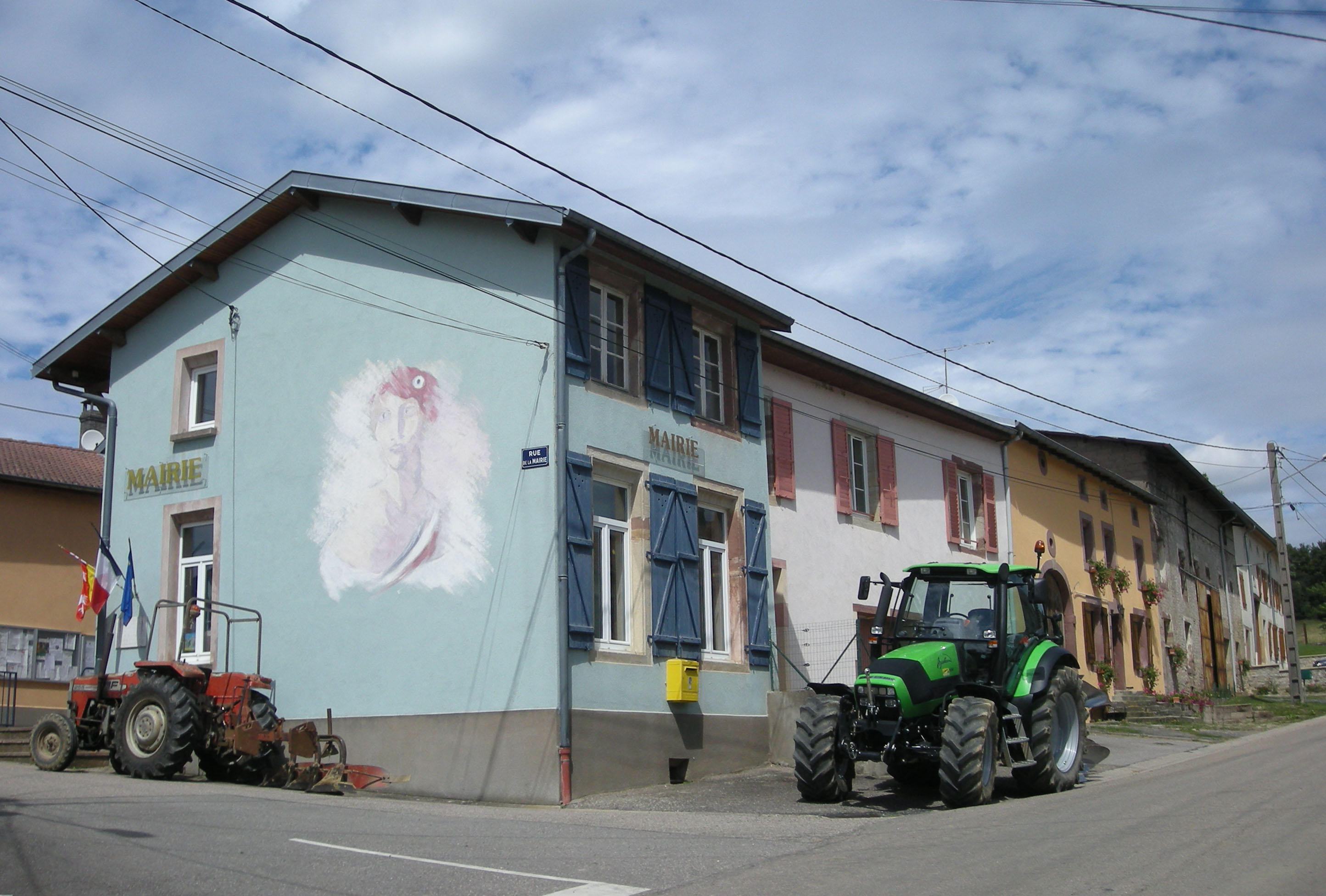 Mairie de Reherrey (Meurthe-et-Moselle)